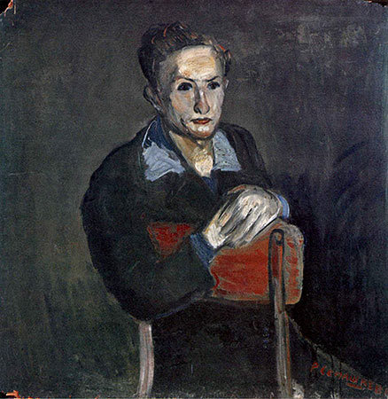 Партрэт Таўлая